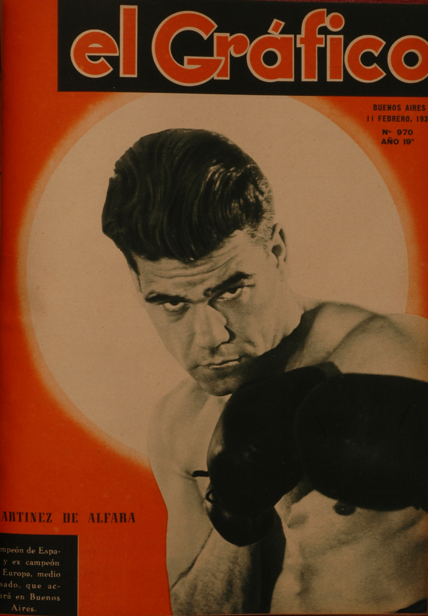 El Grafico del 11 de Febrero de 1938. Edicion 970